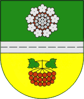 Проект герба с. Калинівка (Макарівський район) з альбому "Символіка Макарівщини"